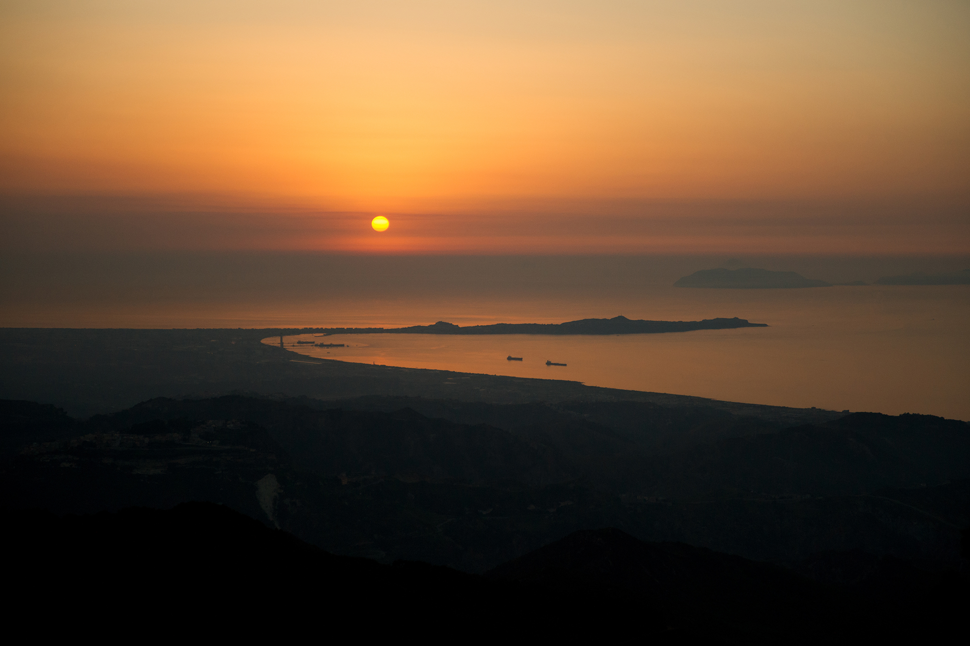 Landscape Shot